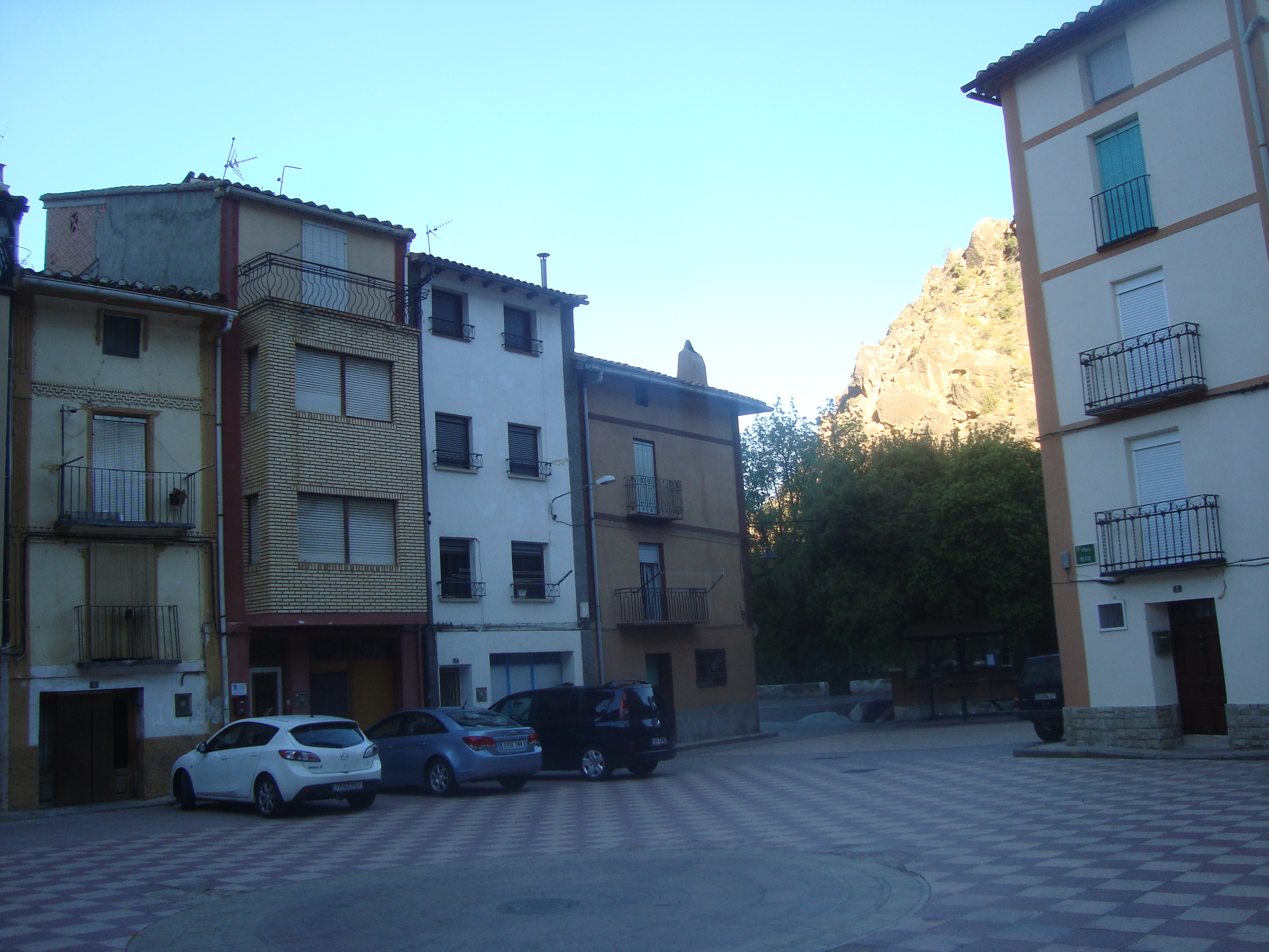 Libros (Comunidad de Teruel)